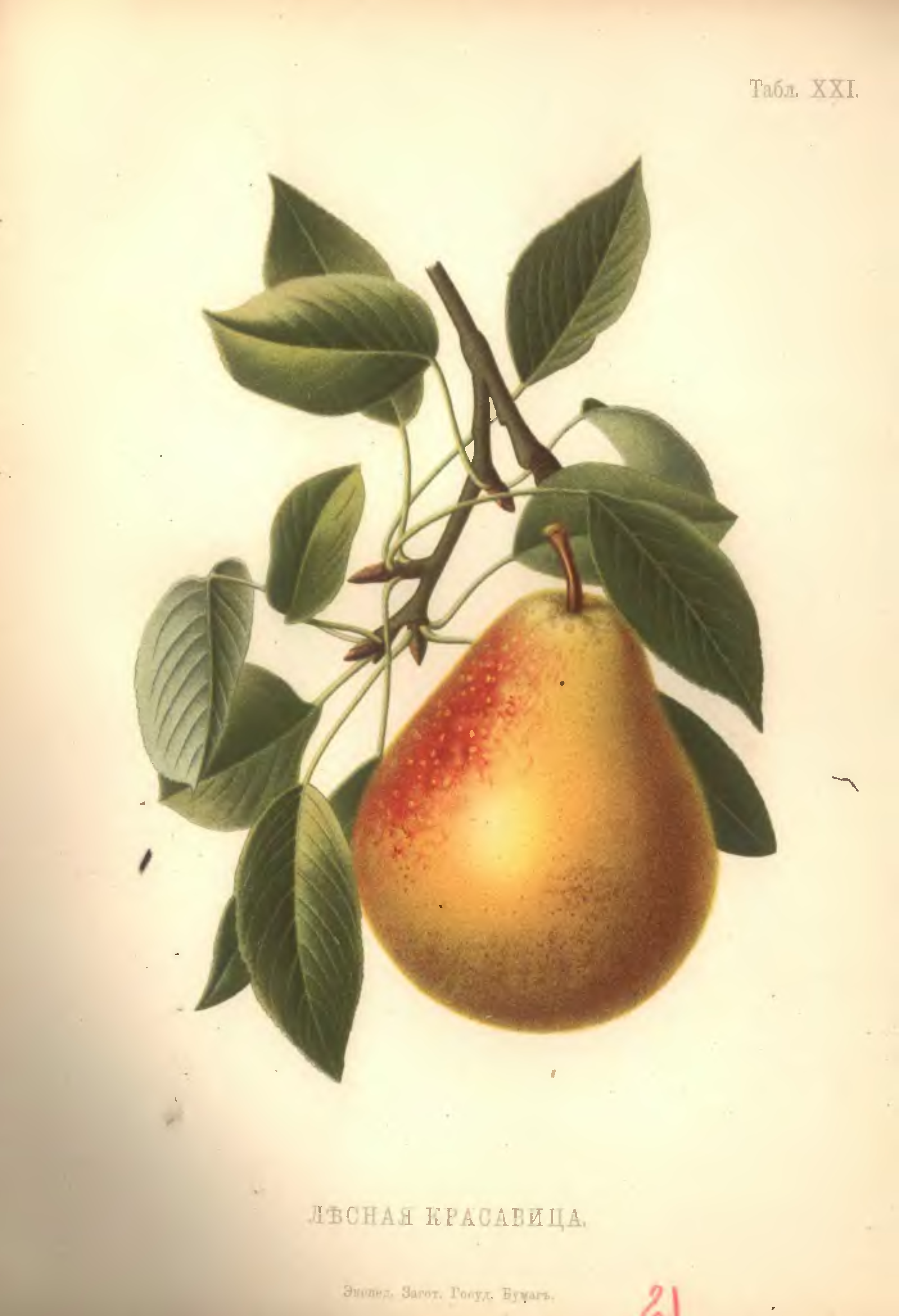 Лесная красавица